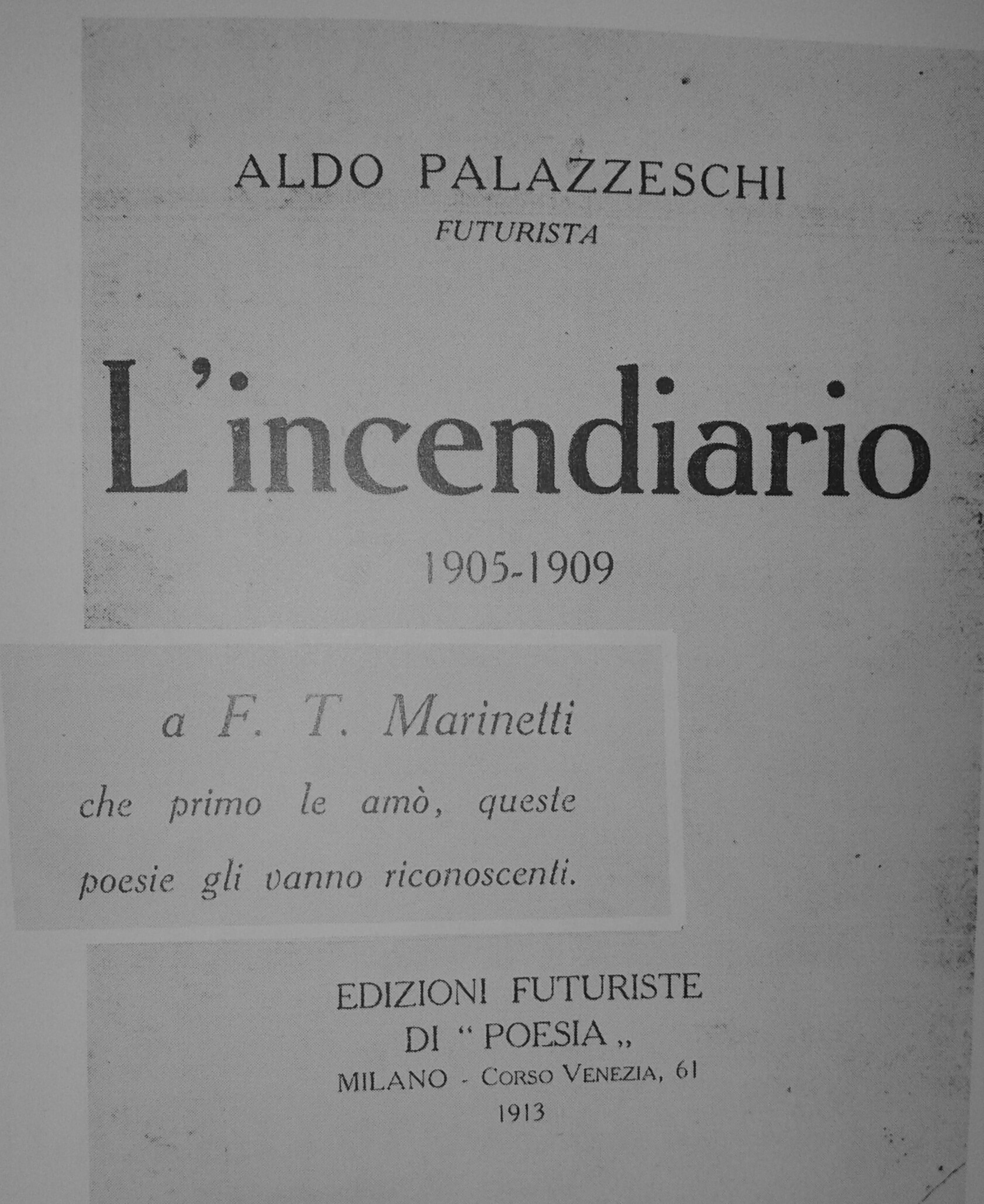 Cover of the book "L'incendiario" by A. Palazzeschi, Second edition, pubblished in 1913